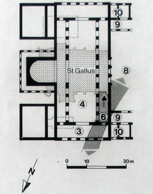 Grundriss der St.-Gallus-Kirche in Ladenburg (Tafel an der Nordwestecke).